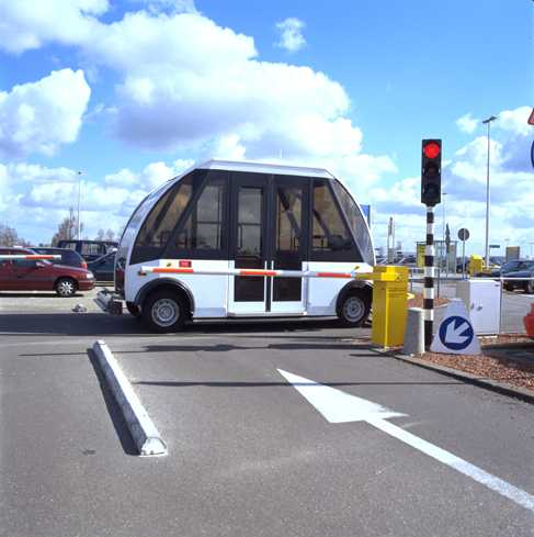 ParkingHopper op langparkeerplaats P3.